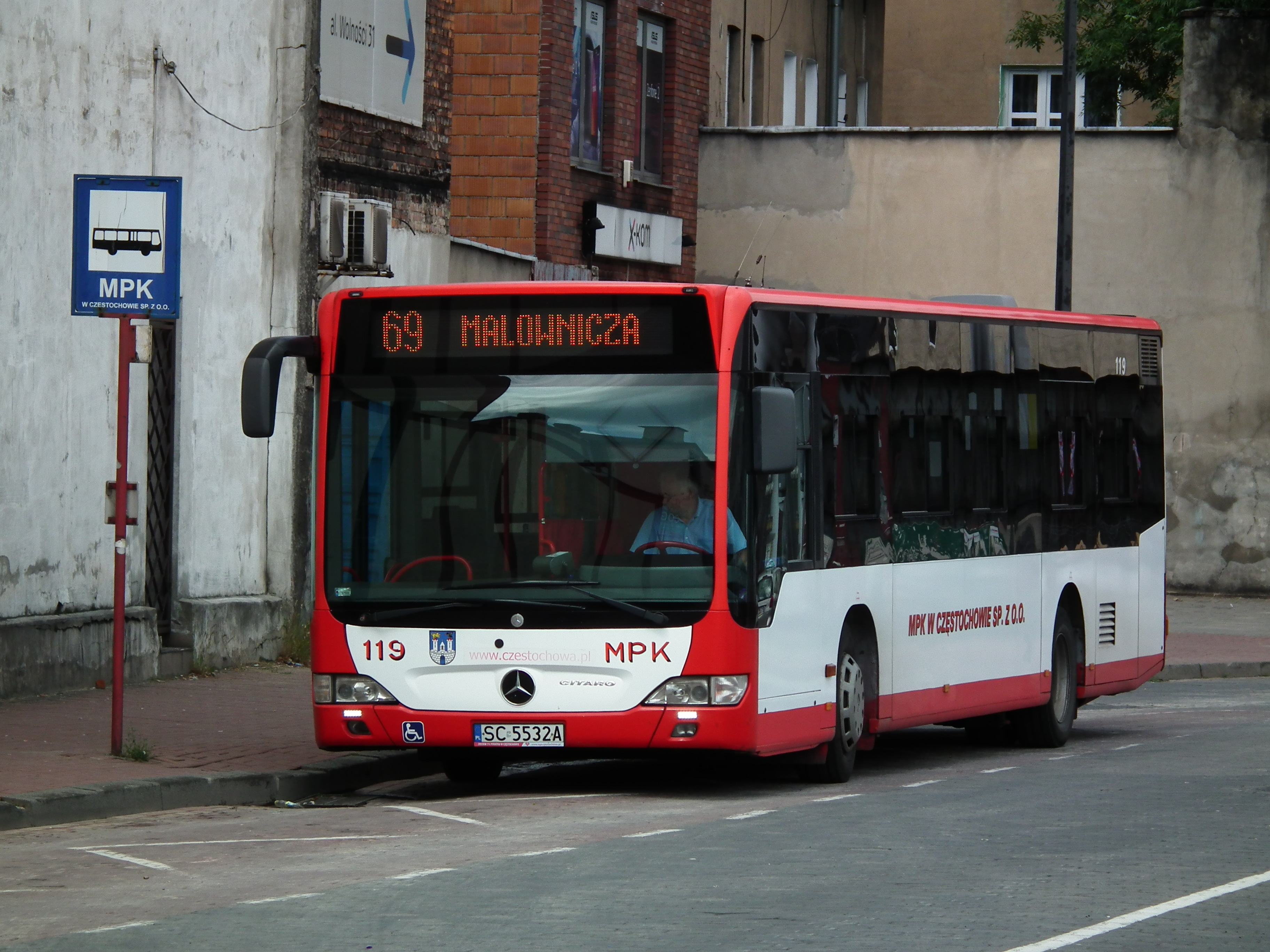 Mercedes Citaro w Częstochowie na dworcu PKS.